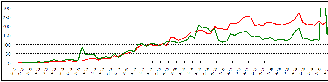 數據來自 綠線：該月每日平均新增條目數。 紅線：該月編輯量過百次用戶數。 橫軸刻度為時間。F、A、J、A、O、D分別為該年的2月、4月、6月、8月、10月、12月。